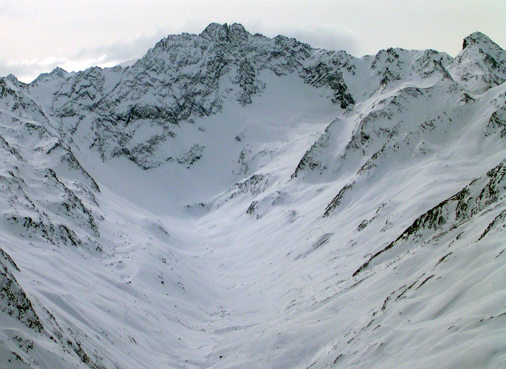 Hohe Villerspitze from NE